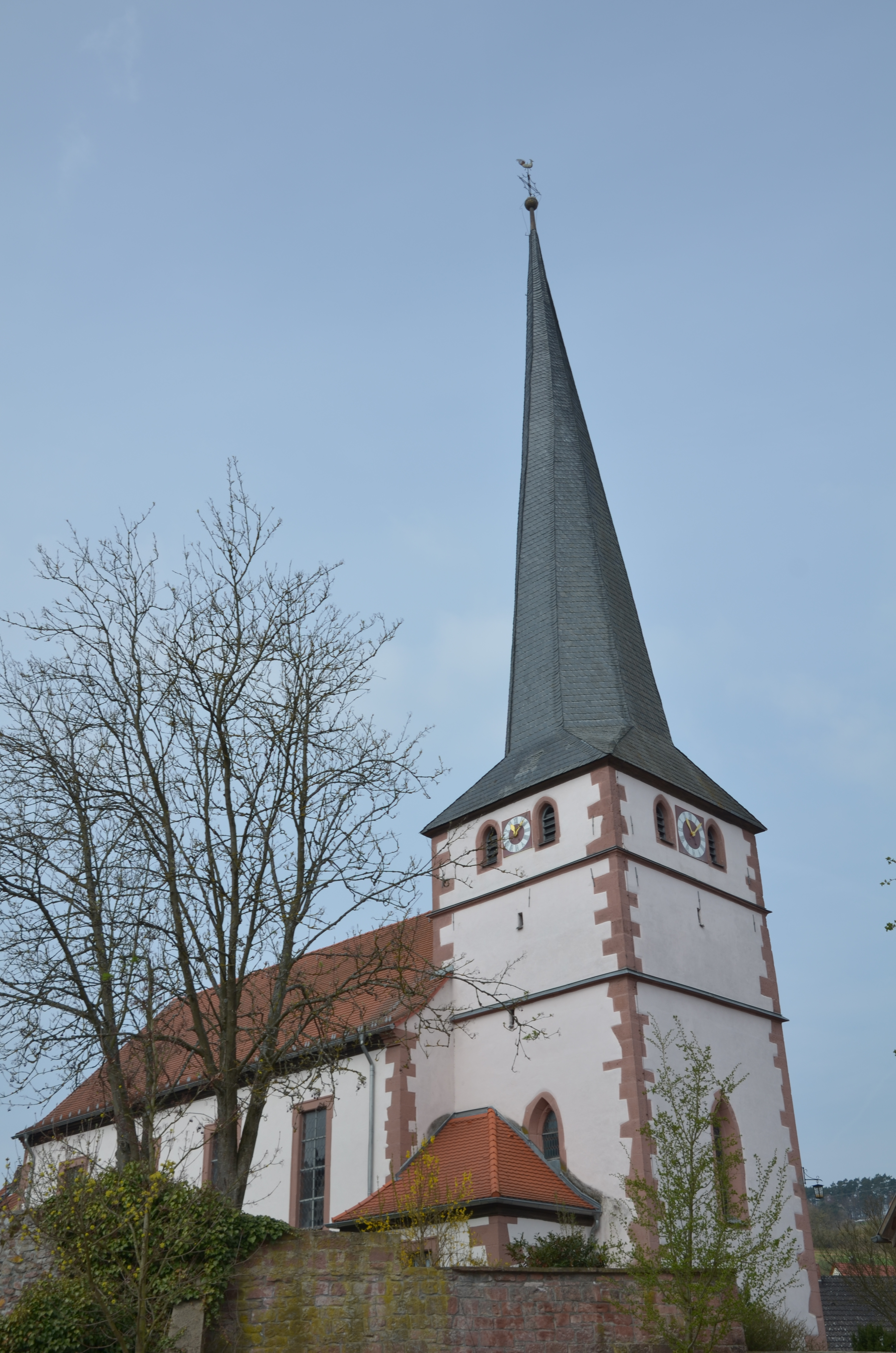 evang.-luth. Jakobuskirche in Mittelsinn